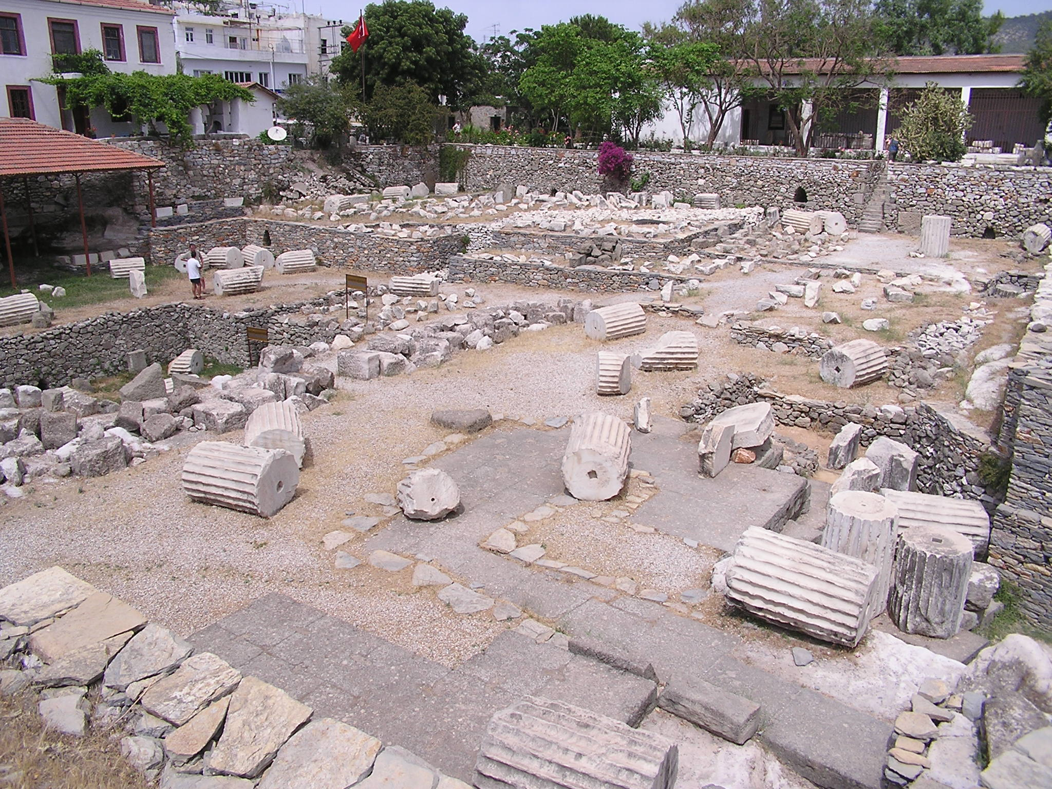 Archeologické vykopávky a muzeum na místě bývalého mauzolea.